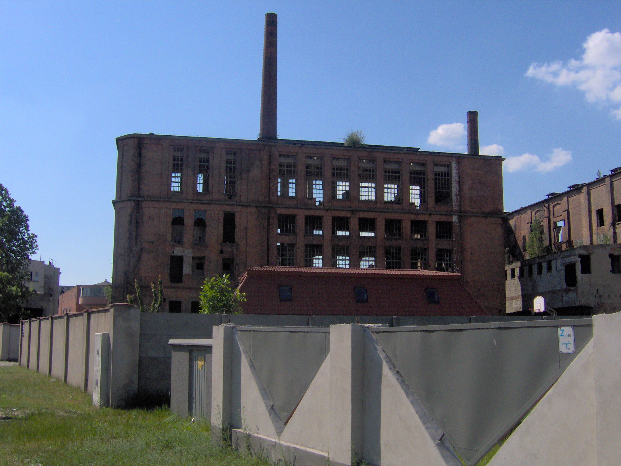 Pozostałości po celulozie (2007 r.)